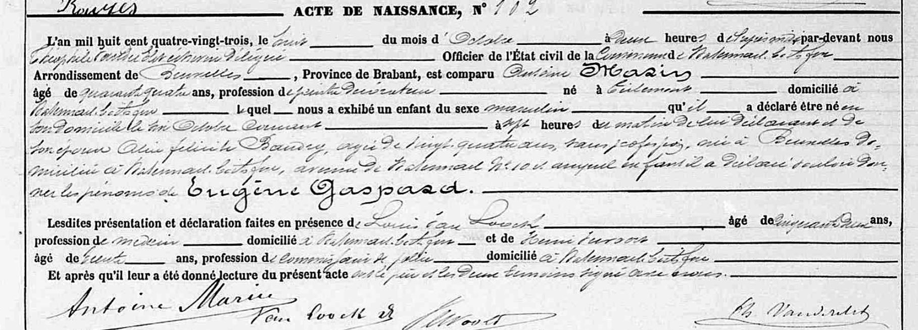 Kopie uit de registers van de burgerlijke stand van de gemeente Watermaal-Bosvoorde